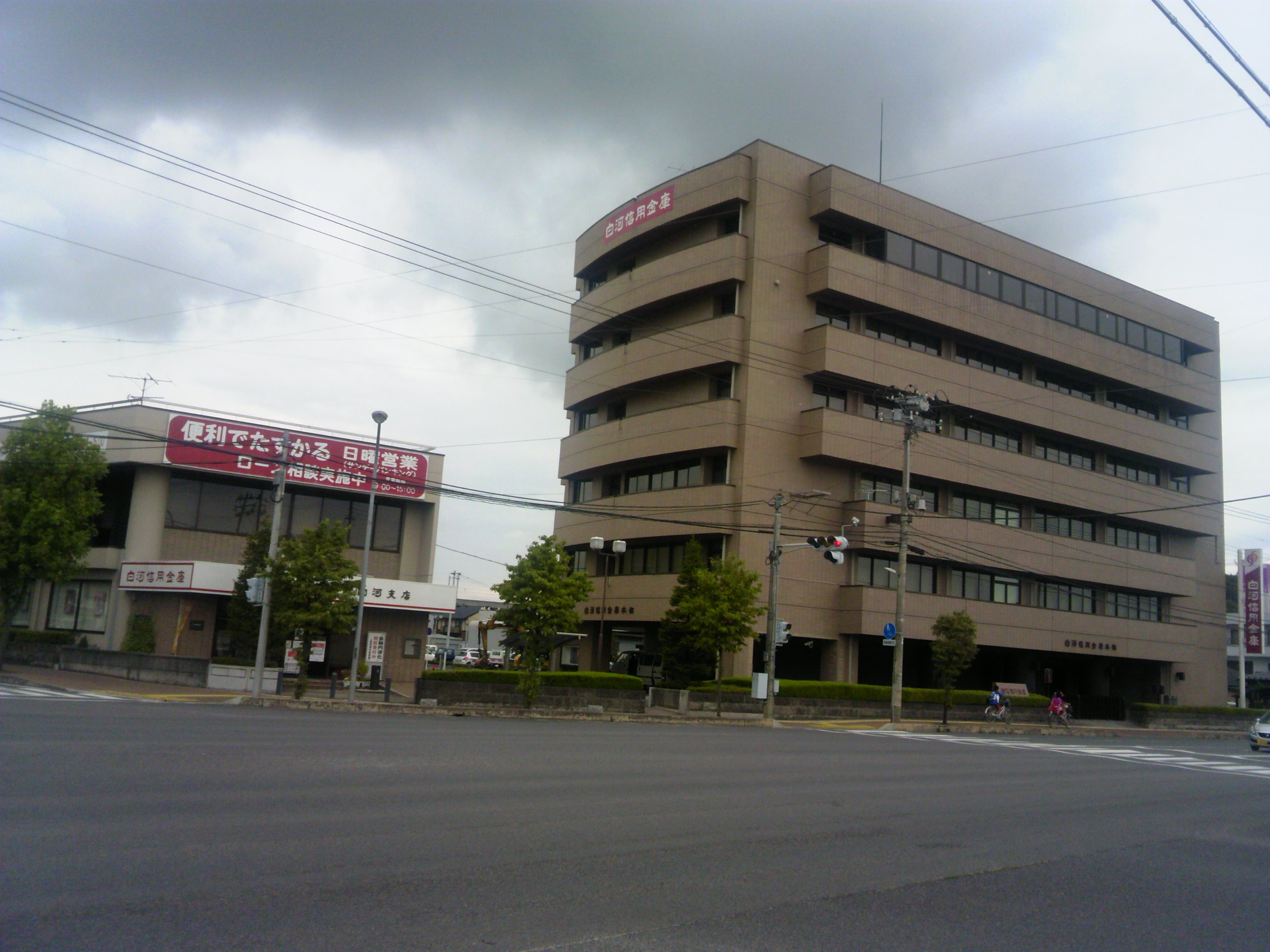 白河信用金庫本部(右）と新白河支店